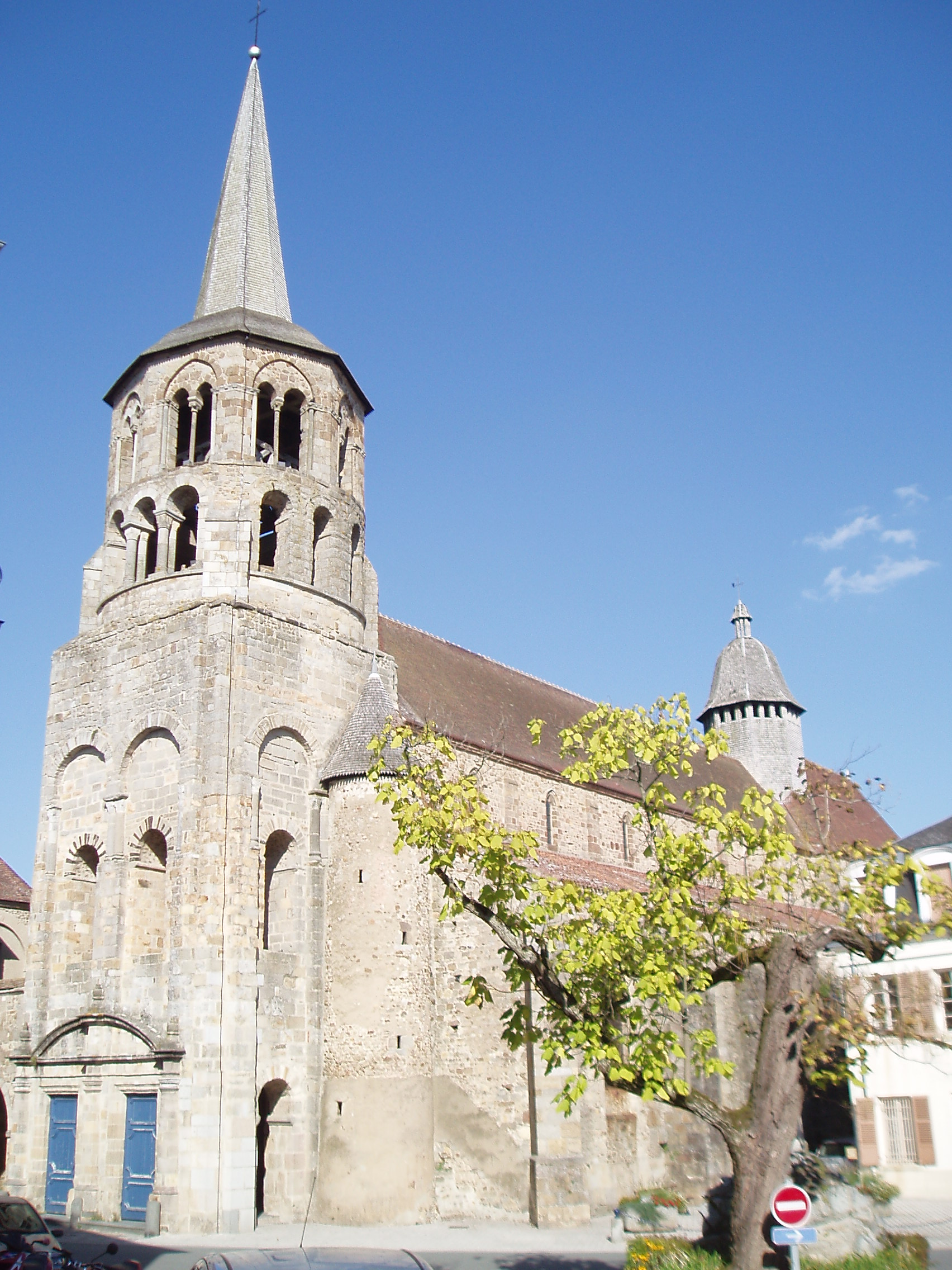 Eglise